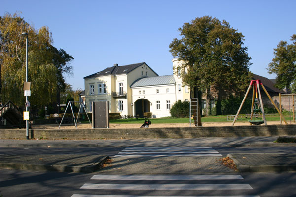 Auf der Mittelstraße in Elsdorf